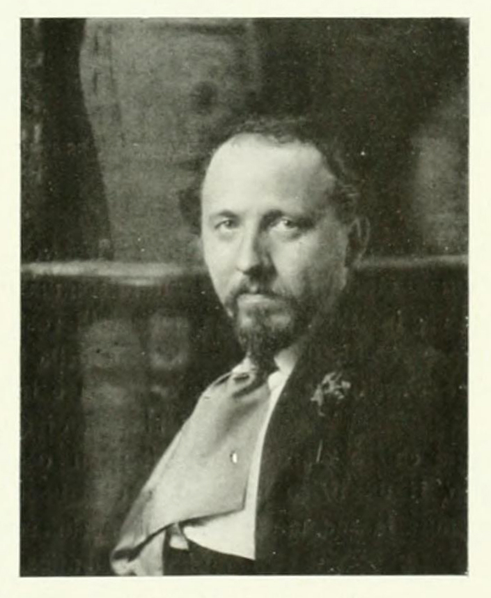 Ritratto fotografico di Antonio Ambrogio Alciati (1878-1929); in Emporium, febbraio 1916